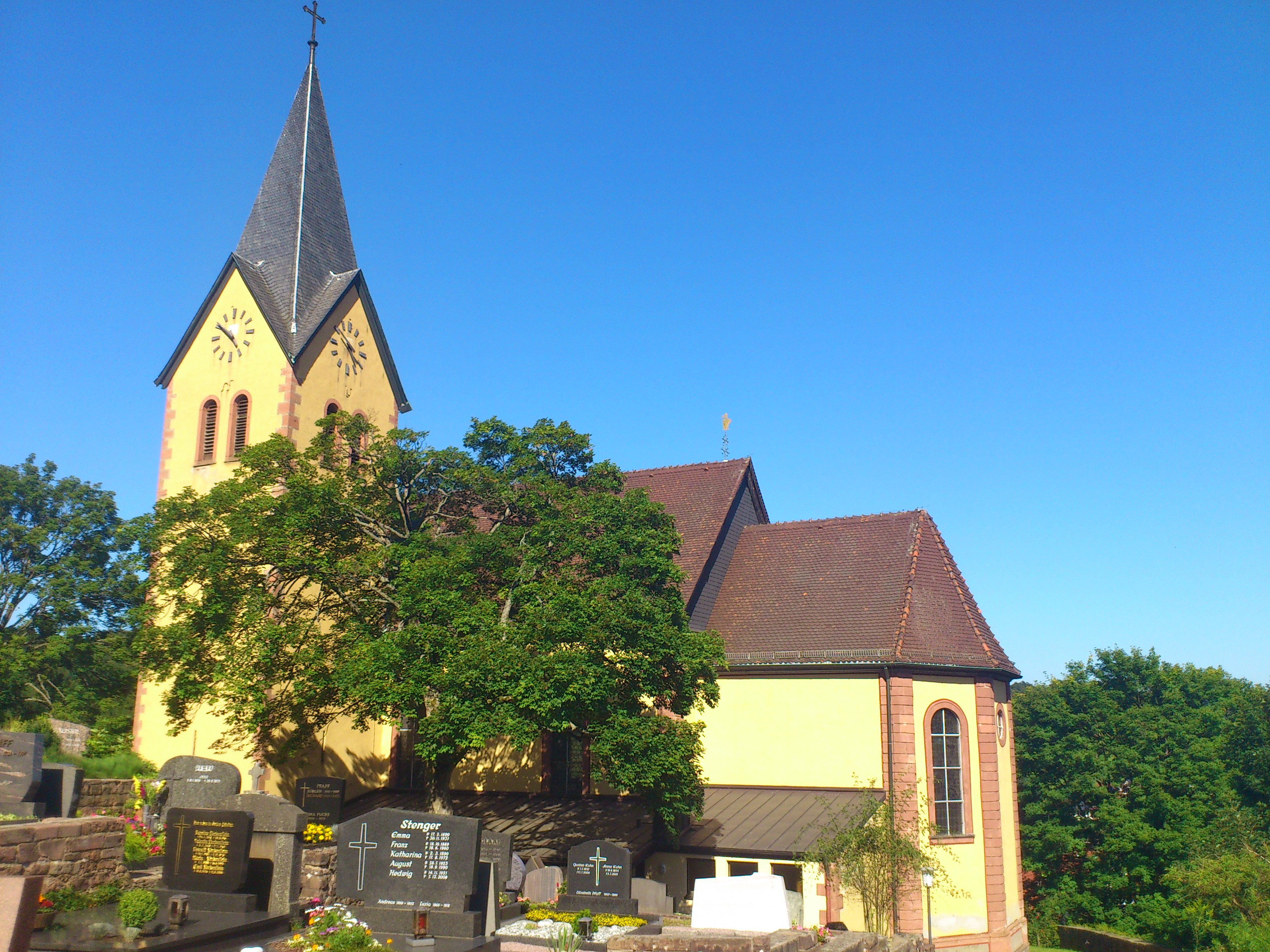 Die katholische Pfarrkirche St. Lambertus und St. Sebastian in Krombach